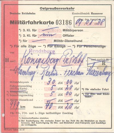 Militärfahrkarte im Ostpreußenverkehr 1938 von Rendsburg nach Königsberg (Pr.), 999 km, ein Offizier, ohne Militär-Diensthund (sic!)